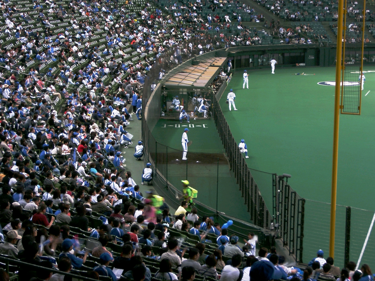 “Seibu Dome” Seibu Lions professional baseball team located in Tokorozawa, Saitama, Japan. “西武ドーム” 日本の埼玉県所沢市にあるドーム式野球場。日本のプロ野球パリーグに加盟する、西武ライオンズのホーム球場でもある。一塁側西武ライオンズのブルペンを外野席から撮影。